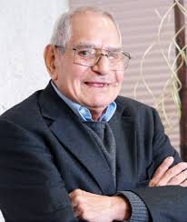 Macario Aguirre Puente , profesor de la division de arte , arquitectura y diseño.